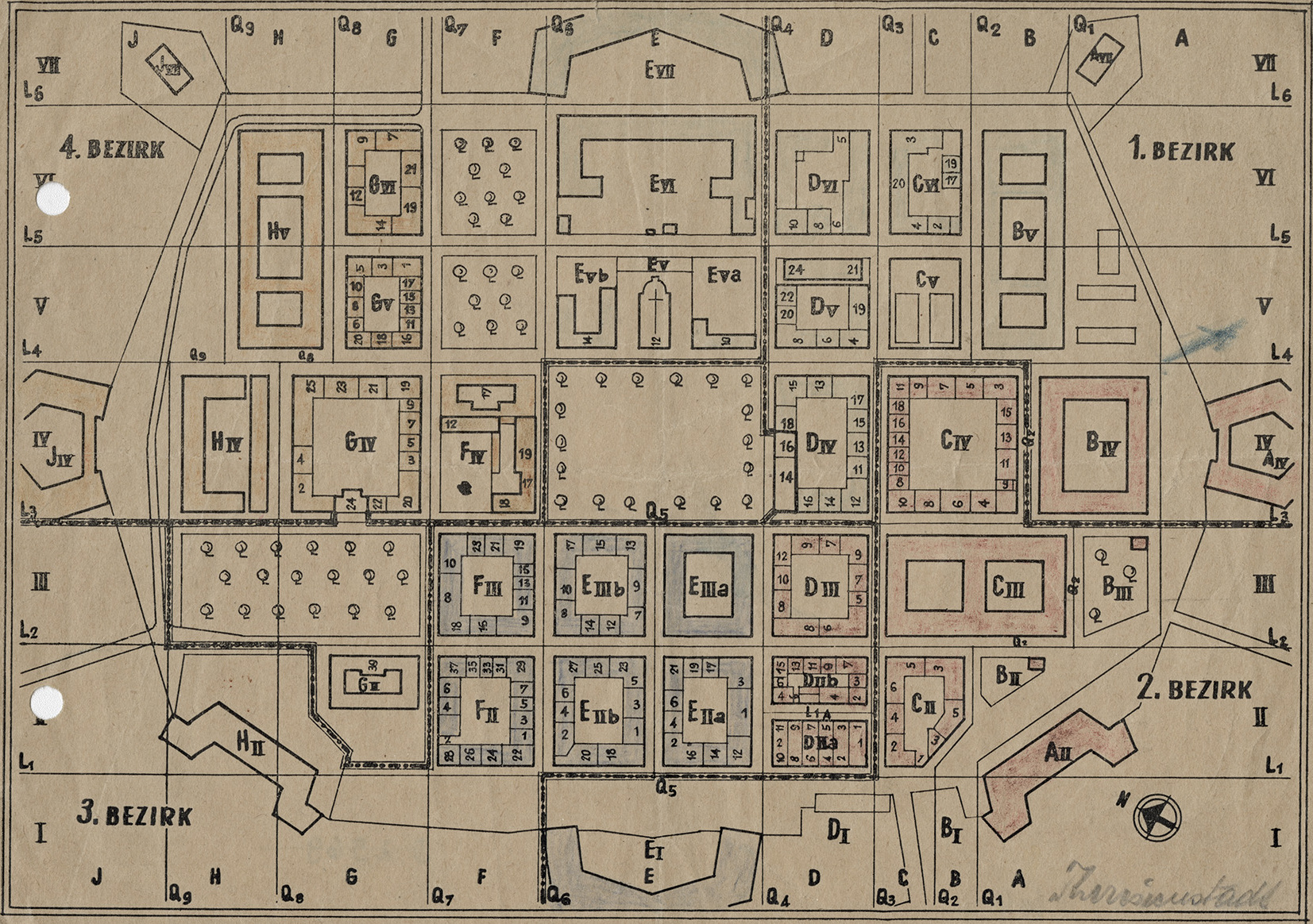 Plan des Ghettos Theresienstadt, um 1942